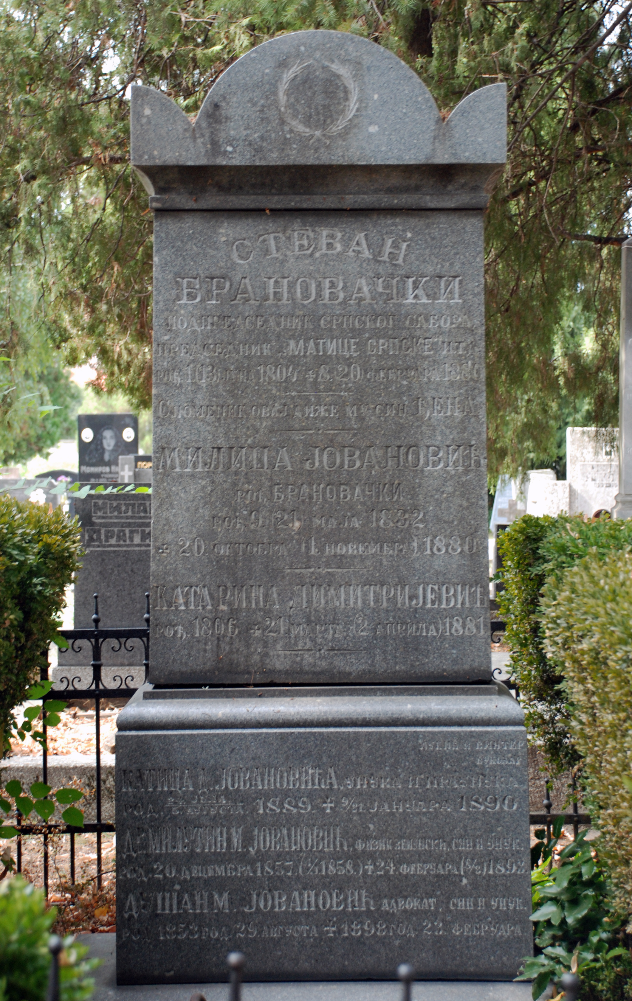 1804-1880, адвокат и политичар, градоначелник Новог Сада, председник Матице српске, један од оснивача Српског народног позоришта.